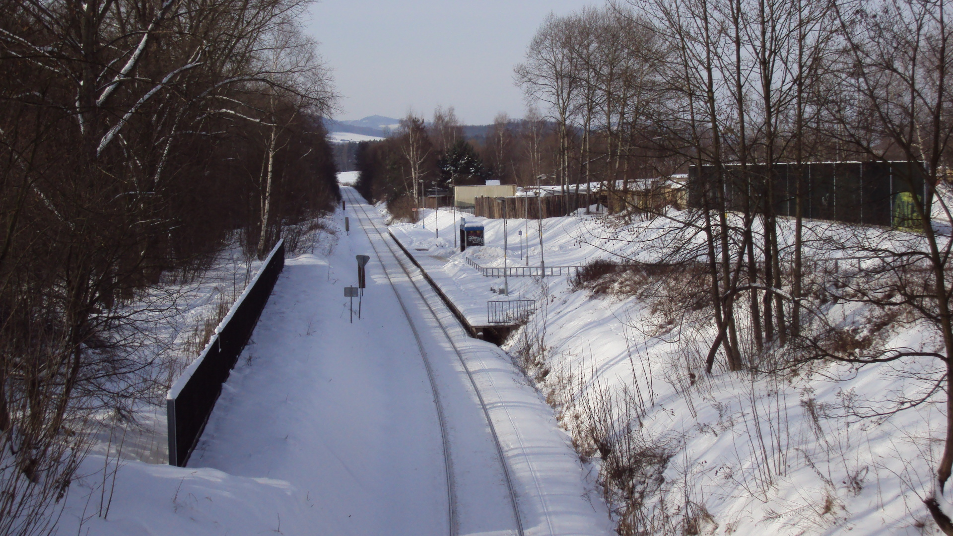 Česky: Železniční zastávka Česká Lípa-Holý vrch, fotka z mostu